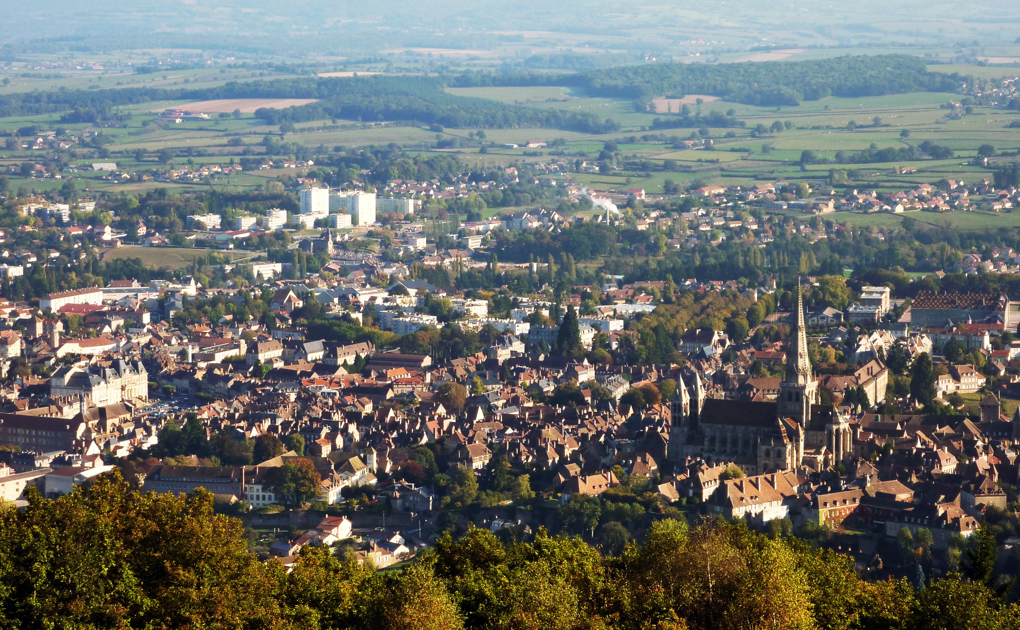 La ville d'Autun (Saône-et-Loire, France) vue depuis les hauteurs de la Croix de la Libération. Au premier plan à l'extrême-gauche gauche on aperçoit le lycée Bonaparte, le théâtre à l'italienne et l'hôtel de ville sur la place du Champ-de-Mars ; à droite la cathédrale Saint-Lazare au cœur de la vieille ville. Au second plan et à l'extrême-droite, recouverte d'un toit bourguignon, une partie des bâtiments du lycée militaire.